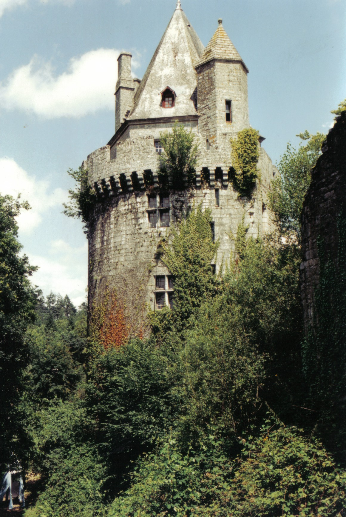 Tour d'Elven (in der Nähe von Vannes)